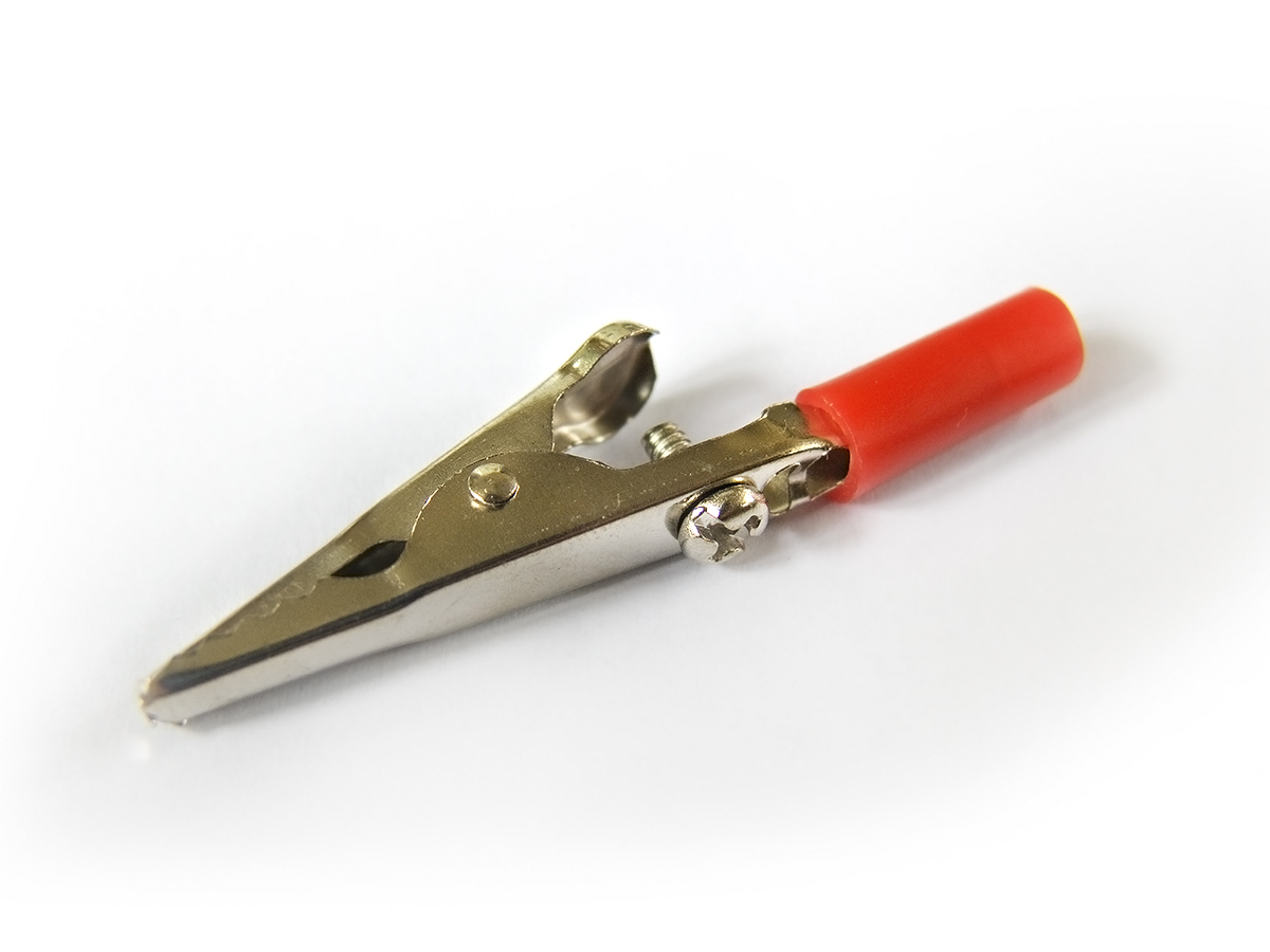 An Alligator clip